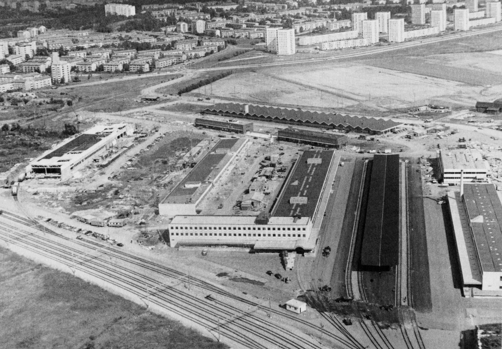 Årsta partihallar etapp 1 under försommaren 1962 (Trädgårdshallen i bakgrunden)